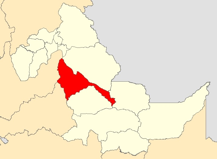 Mapa distrito Iparia,Ucayali - Perú